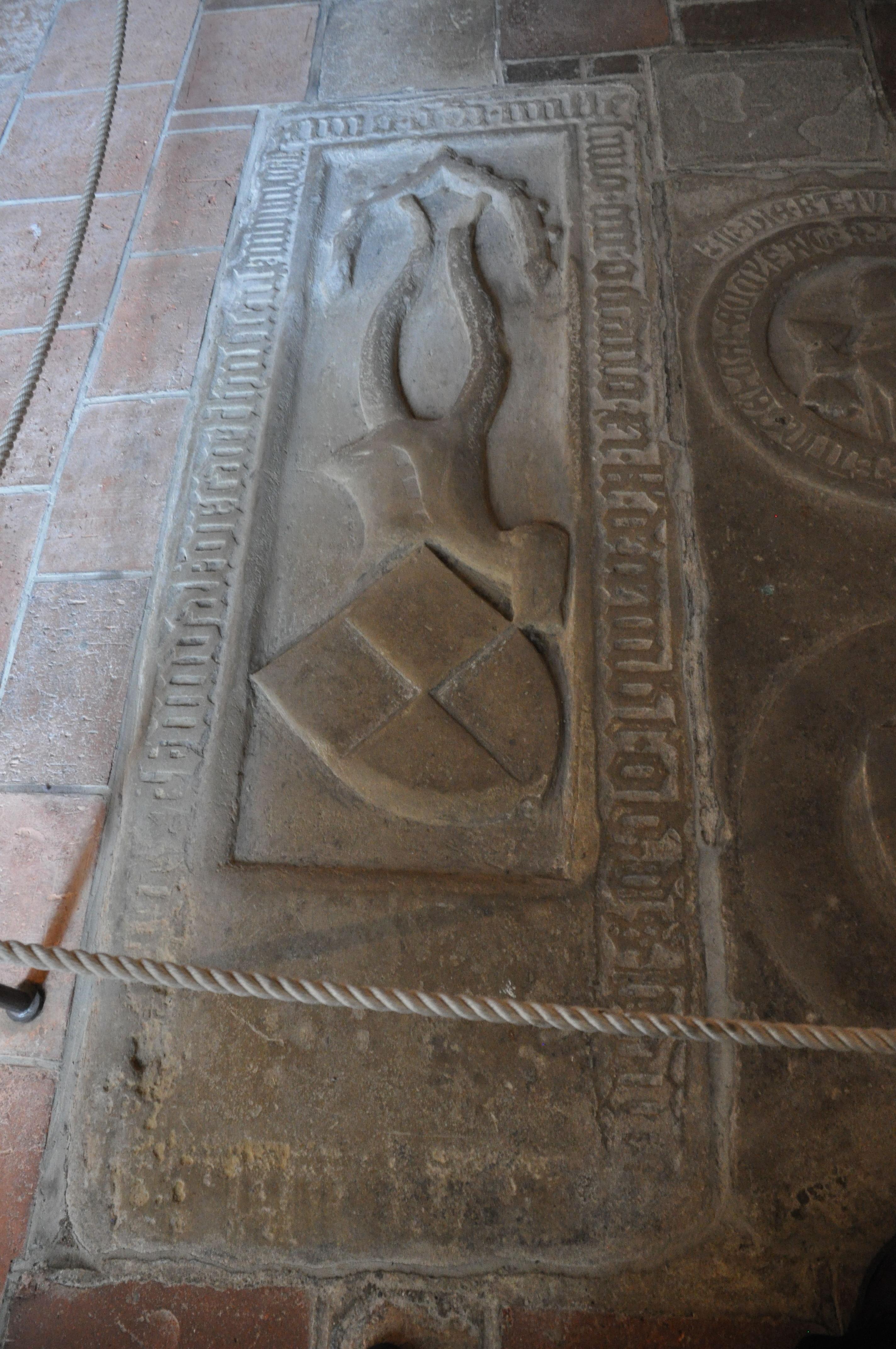 Augsburg, Dom, Kreuzgang, Westflügel, 2. Joch, Grabplatte für Heinrich von Ellerbach († 20./21. November 1408; Kosel Nr. 294, siehe auch Epitaph Nr. 282); mit Wappen Ellerbach mit Helmzier